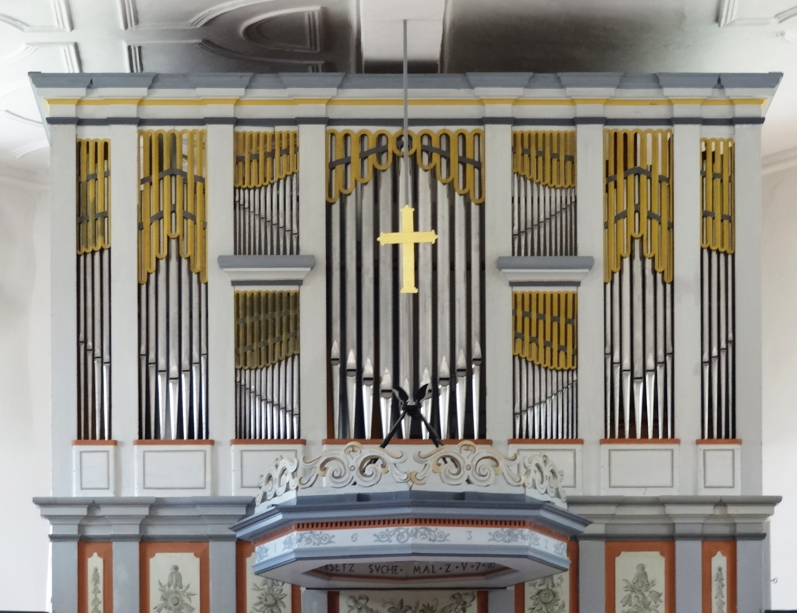 Holzheim Kirche Orgel